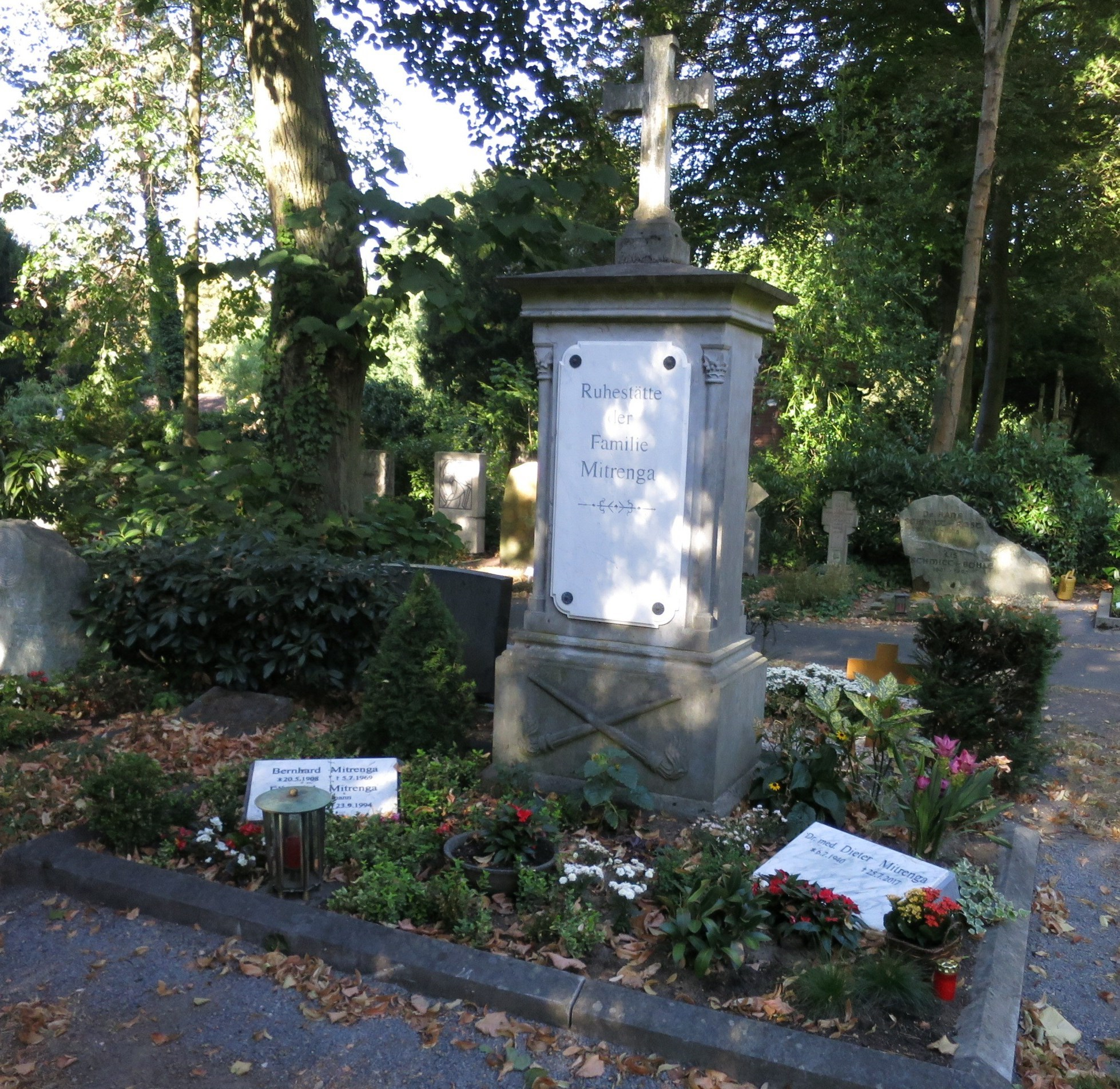 Dieter Mitrenga - Grab Melaten-Friedhof (Köln)